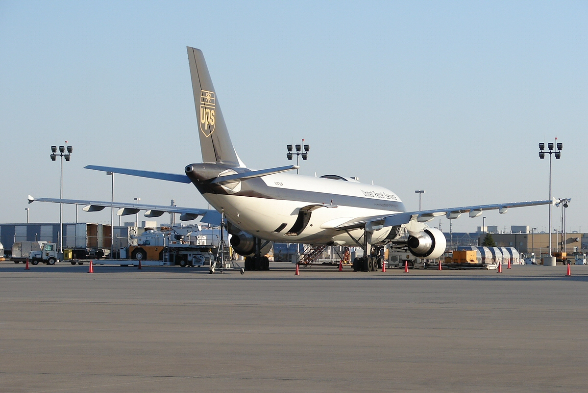 UPS A 300